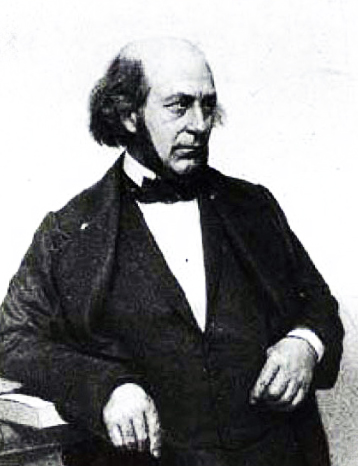 Aimé Thomé de Gamond (1807-1876) père du Tunnel sous la Manche